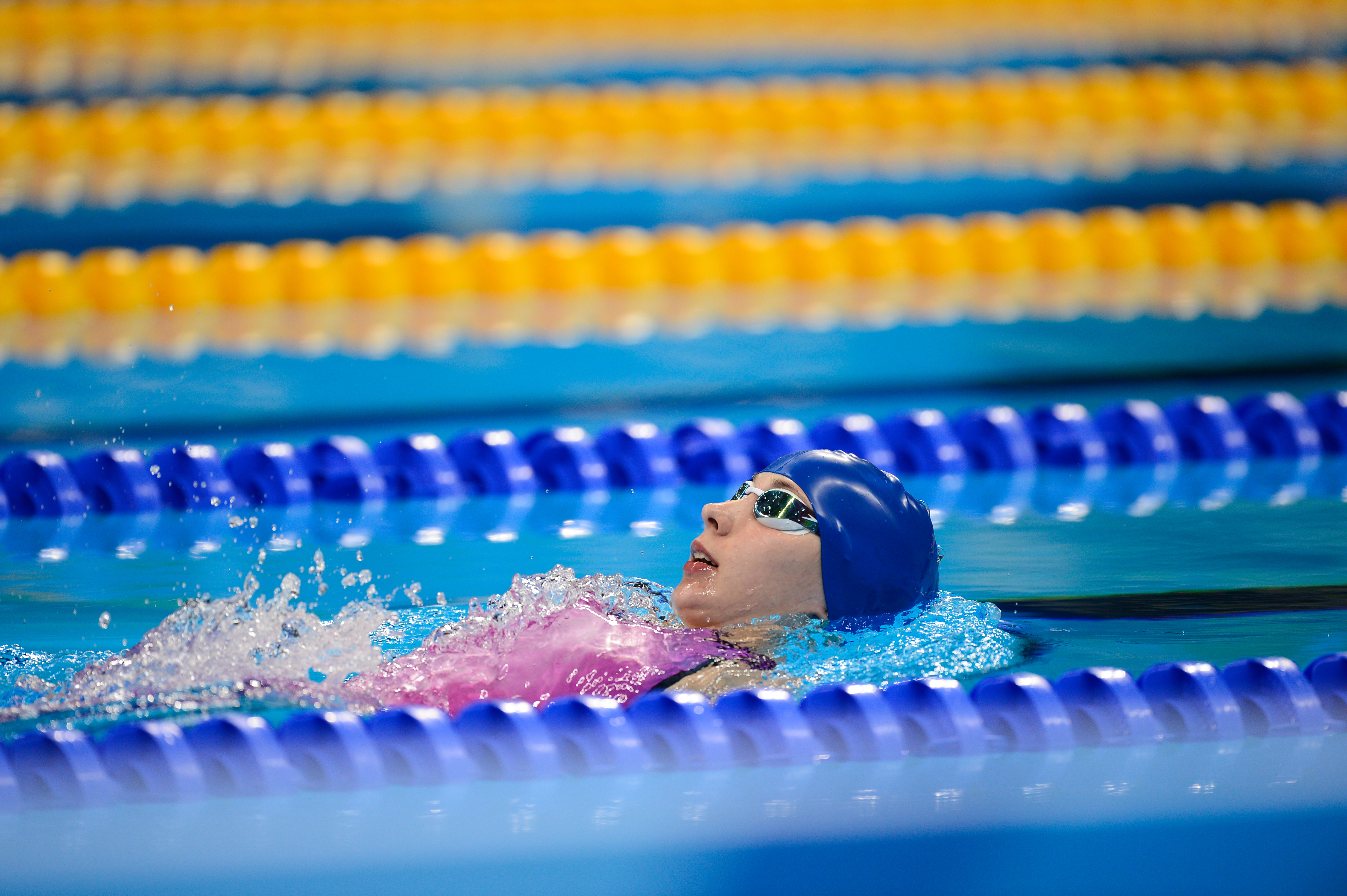 Rio de Janeiro - Oskana Khrul, da Ucrânia, medalha de bronze nos 100m nado costas S6 nos Jogos Paralímpicos Rio 2016, no Estádio Aquático. (Fernando Frazão/Agência Brasil)